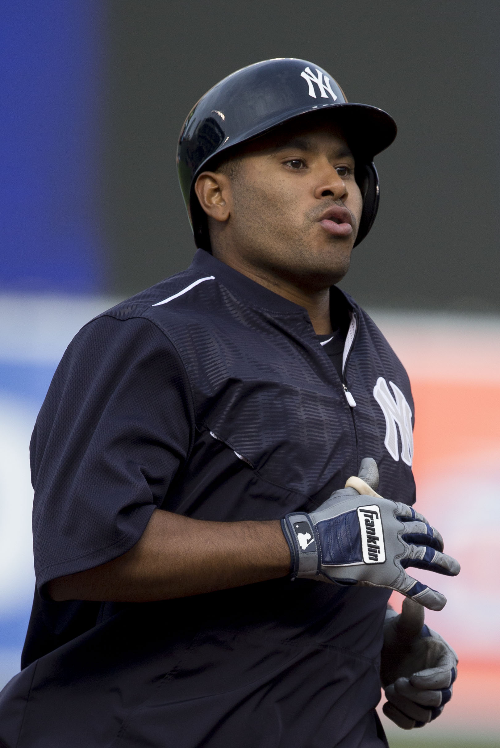 Yankees at Orioles 04/15/15